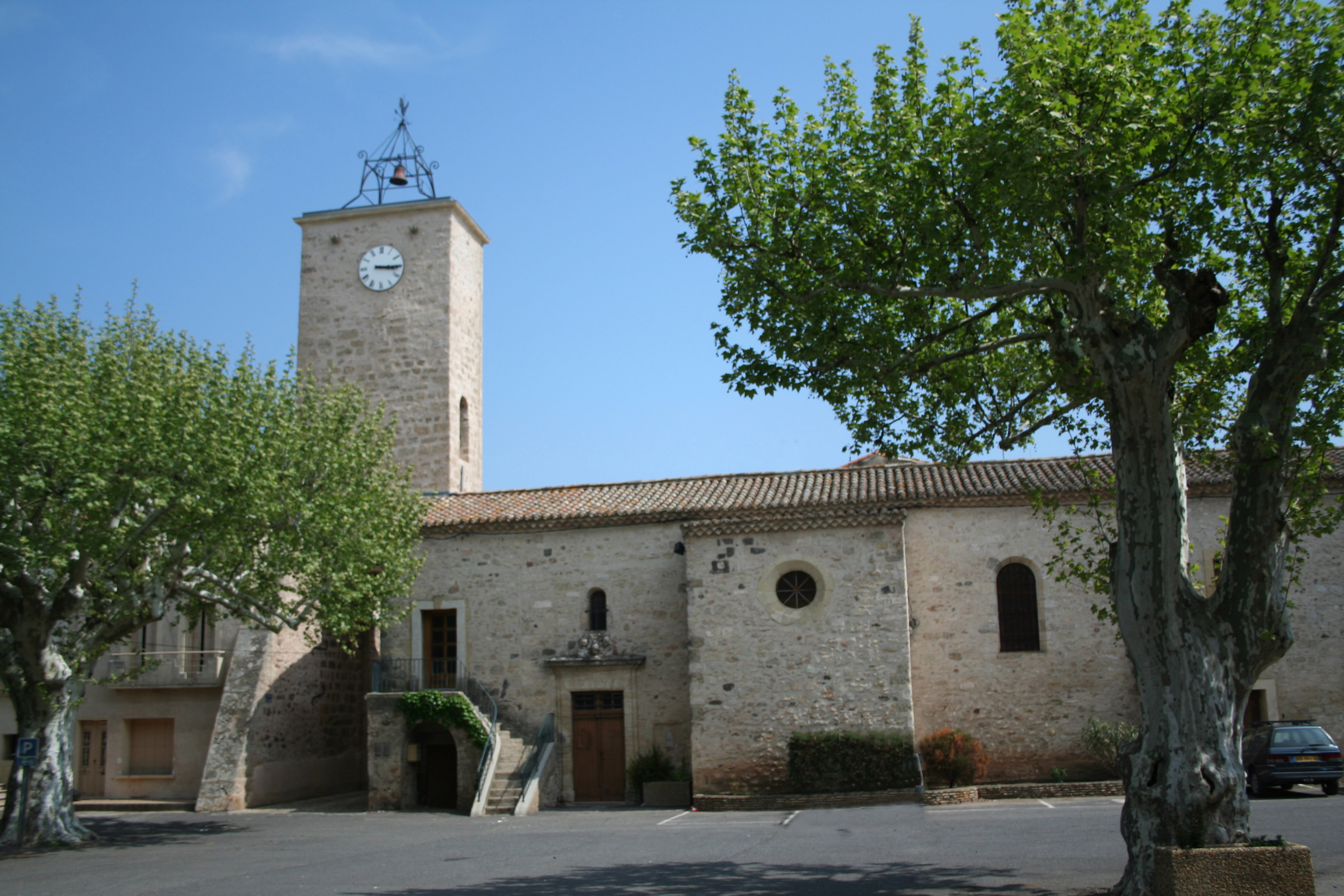 Usclas-d'Hérault (Hérault) - église Saint-Gilles - Tour-clocher.